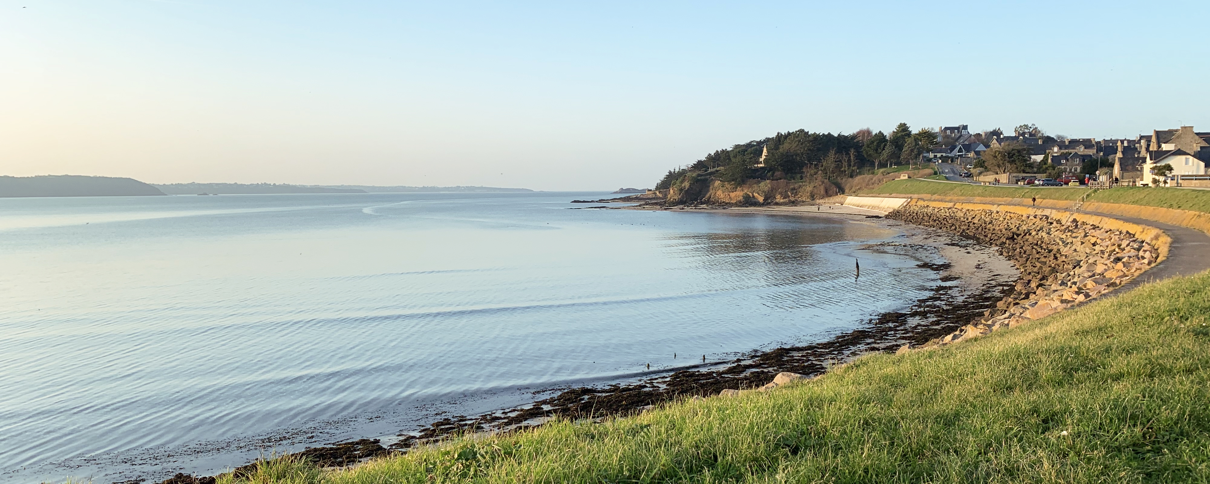 Plage la Banche et pointe du Béchet à Saint-Jacut-de-la-Mer dans les Côtes d'Armor.